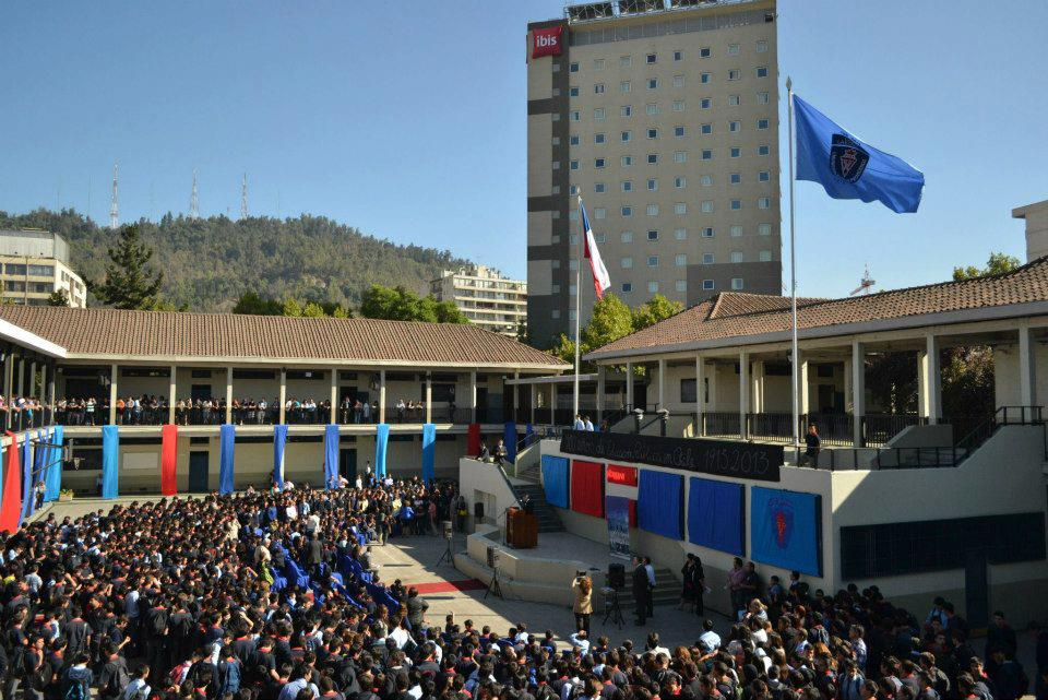 Inicio de clases Liceo Lastarria 2013.